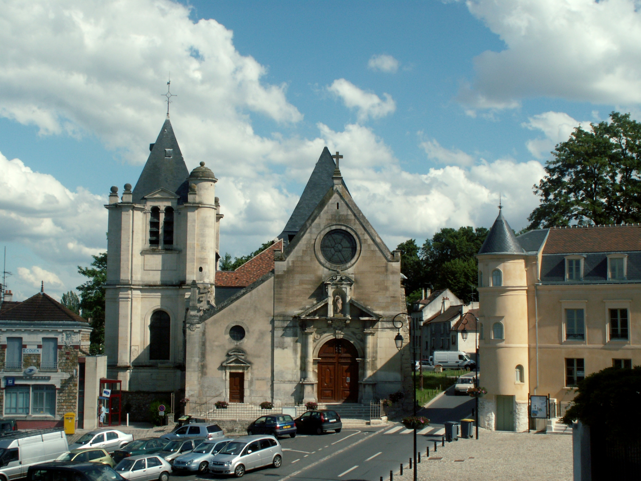 Eglise Saint Acceul d'Ecouen